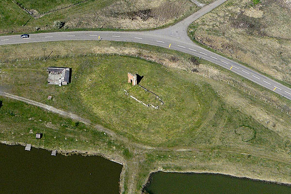 Romtemplom, Folyás